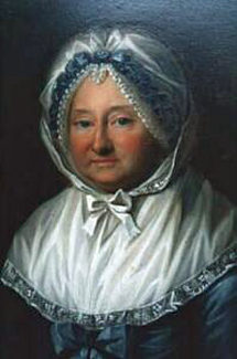 Anna Joachimine von Ahlefeldt (1717–1795), geboren 5. Mai 1717, gestorben 15. Februar 1795 in Kopenhagen